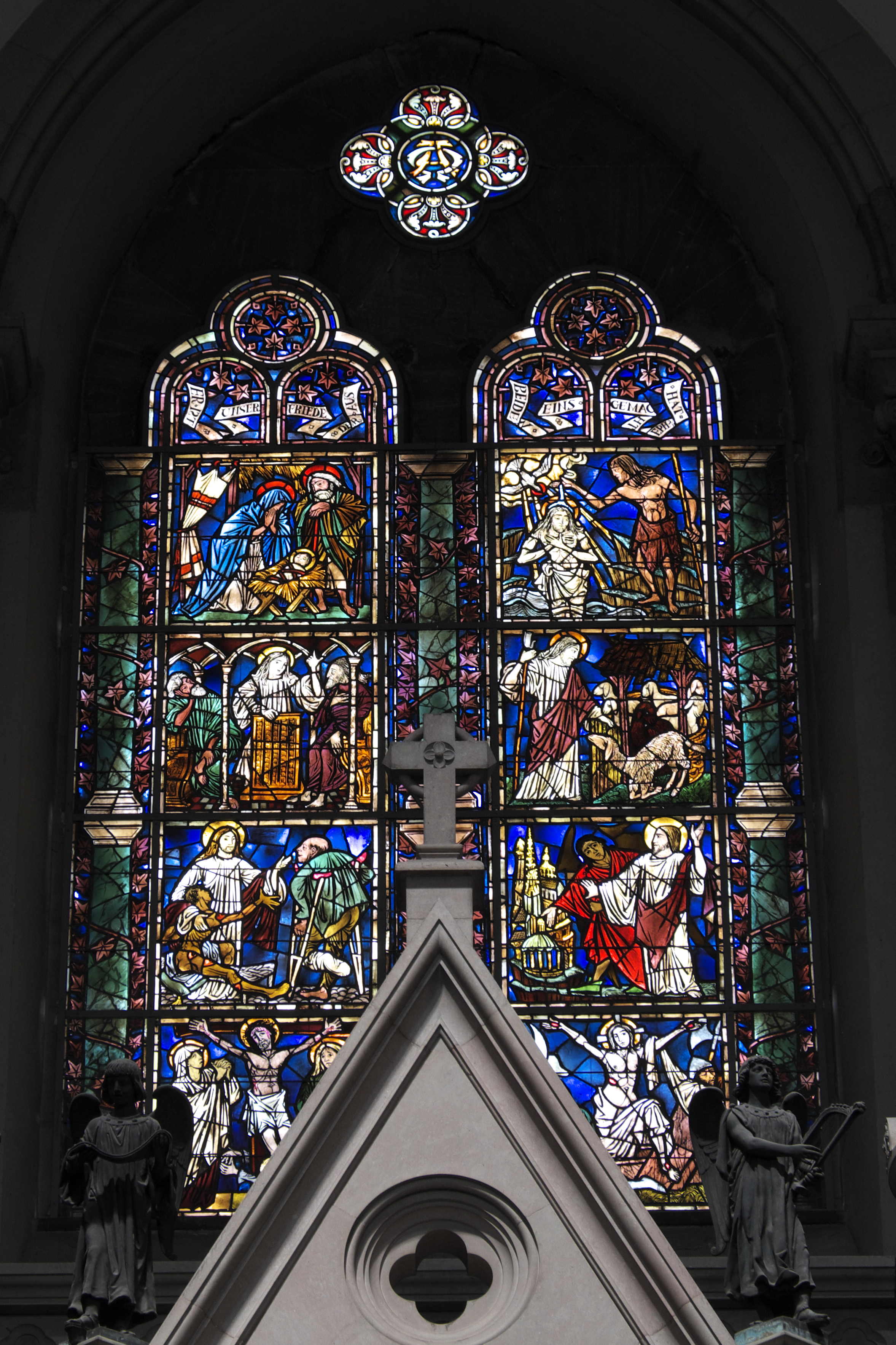 Evangelisch-lutherische Pfarrkirche St. Lukas im Lehel im Stadtbezirk Altstadt-Lehel in München (Bayern/Deutschland), Chorfenster